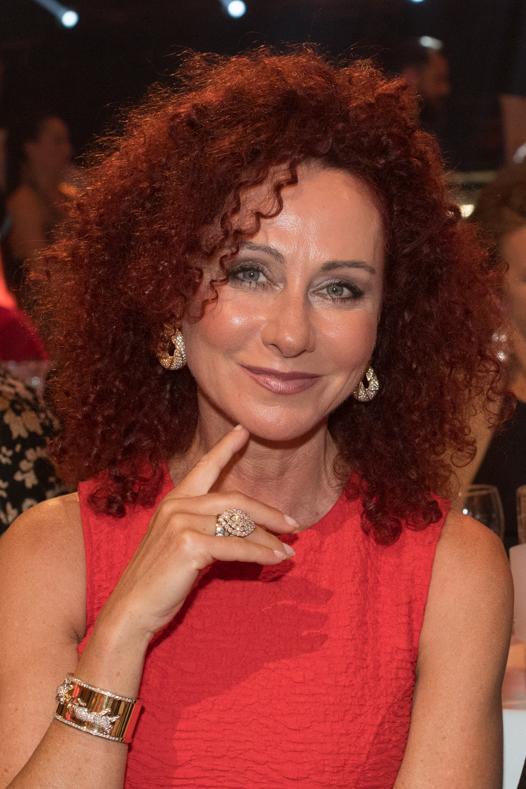 ORF Dancing Stars am 5.5.2017 im ORF-Zentrum Wien. Bild zeigt Christina Lugner.